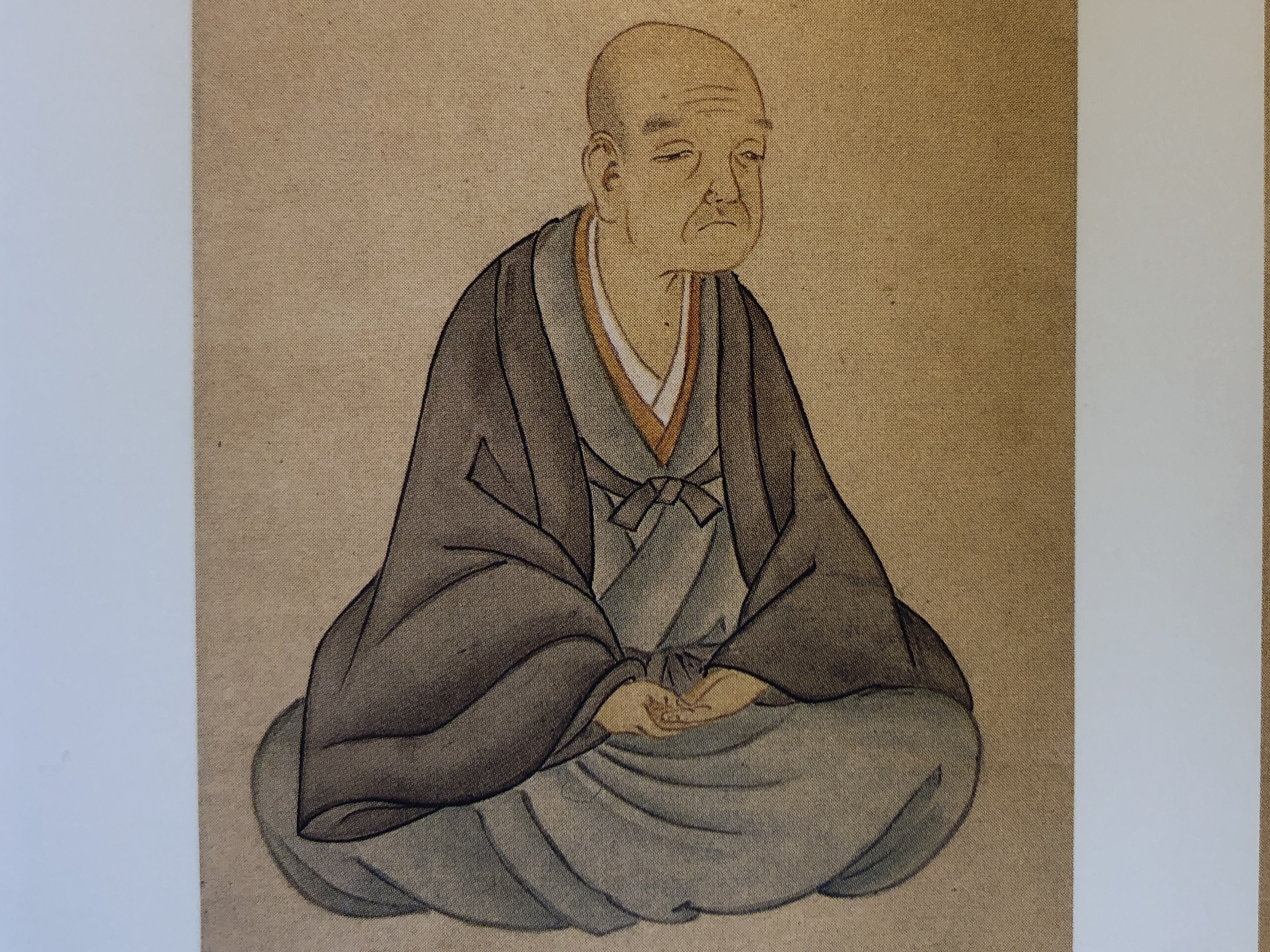 志野流家元9代目 蜂谷葆光斎宗先